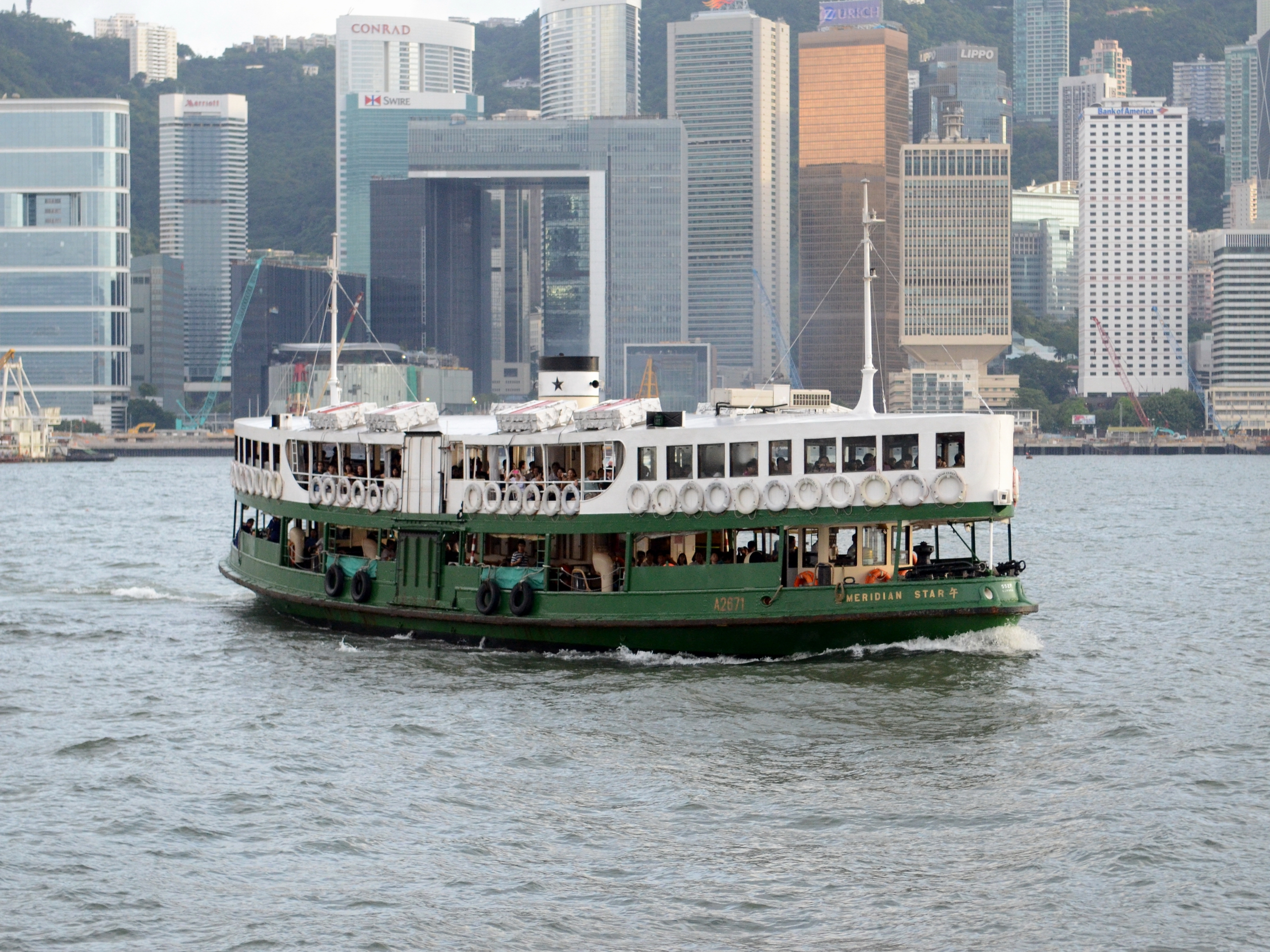 天星小轮 午星（Meridian Star）